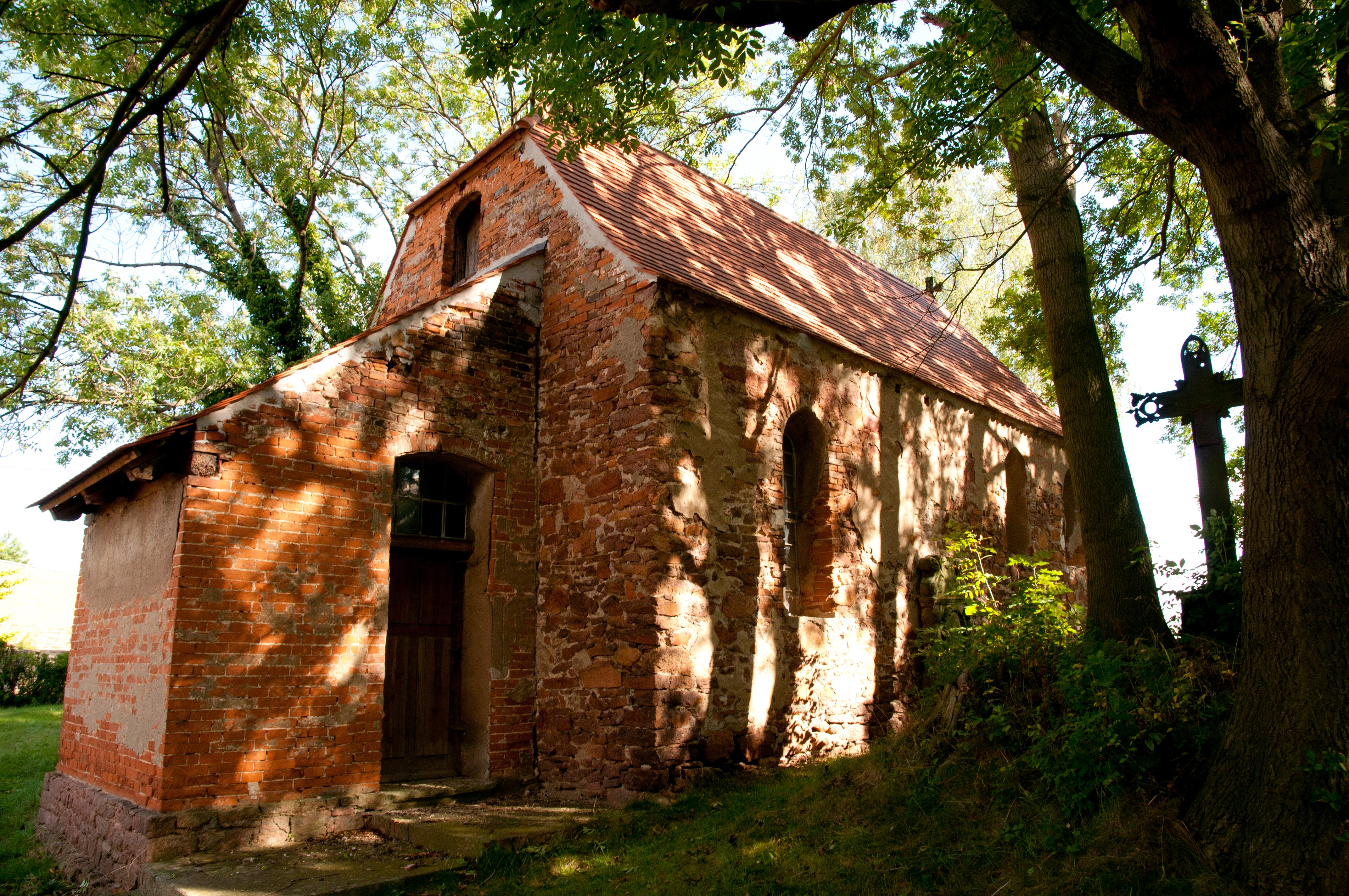 Görbitz Kirche (Sachsen Anhalt, Deutschland)